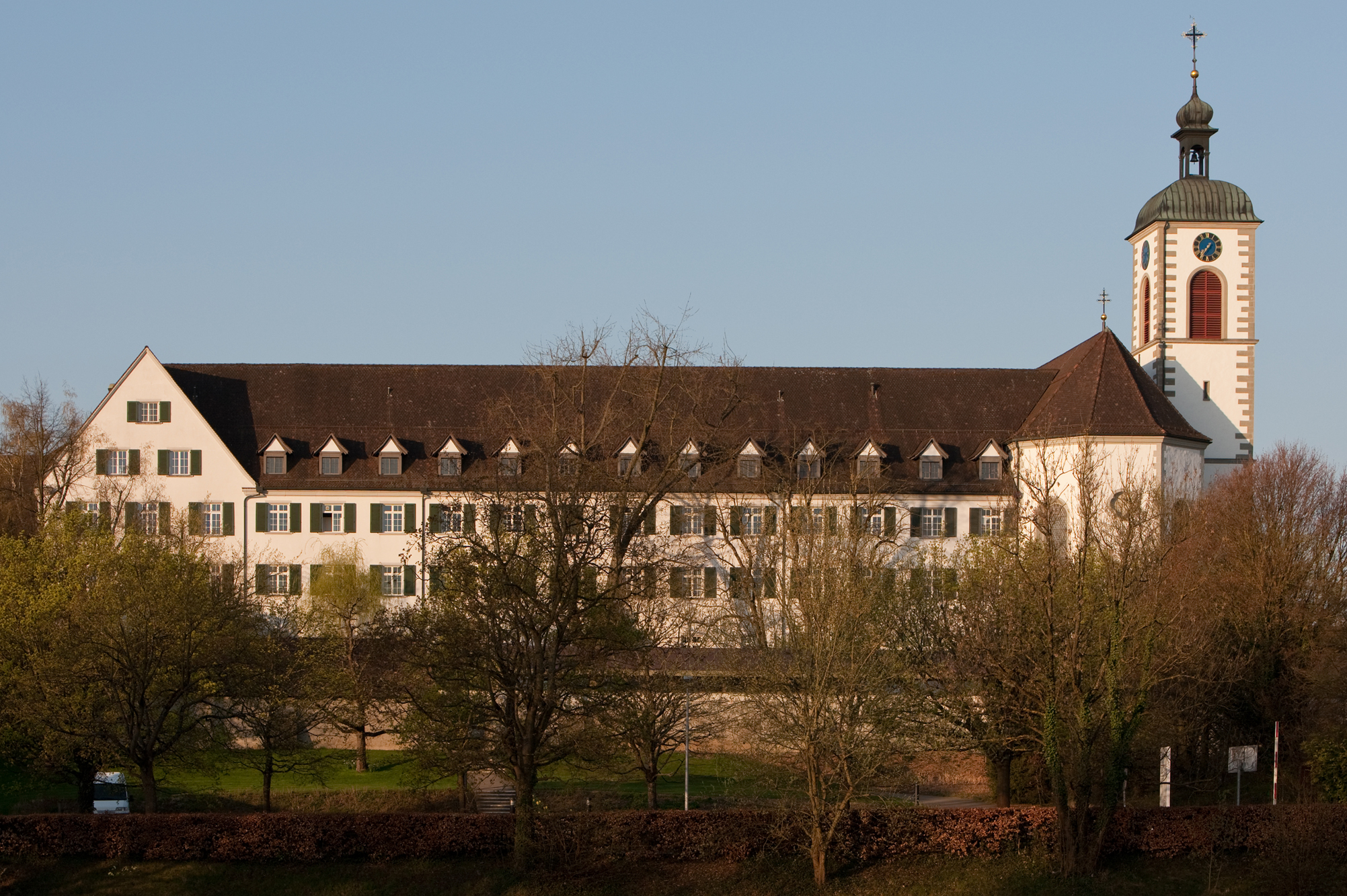 Ehemaliges Augustinerchorherrenstift St. Ulrich in Kreuzlingen